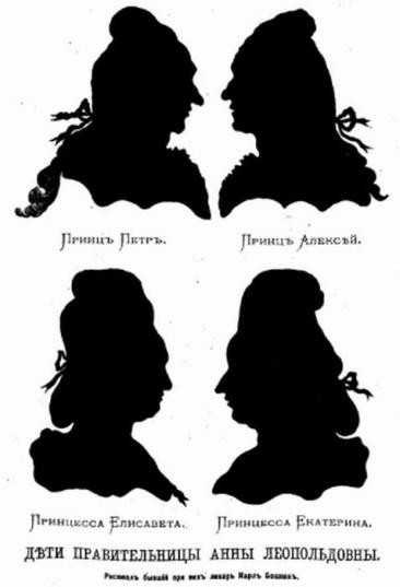 Портреты других детей Анны Леопольдовны и принца Антона Ульриха — принцев Алексея, Петра, принцесс Екатерины и Елизаветы, — нам также не известны. До нас дошли лишь теневые черные силуэты их лиц, вырезанные в свое время К. Бошняком